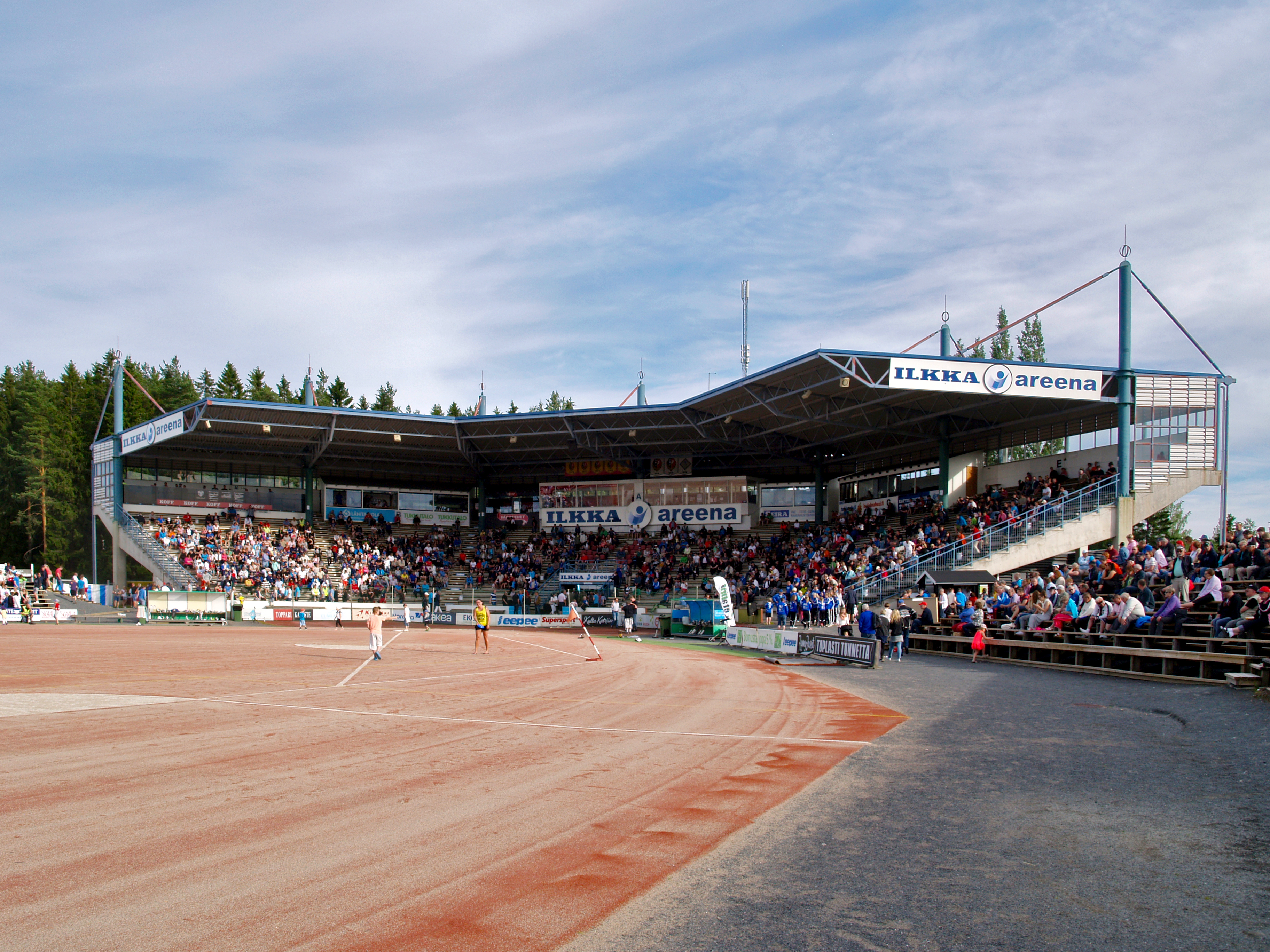 Ilkka-areena JymyJussit - Veto ottelun tauon aikana.